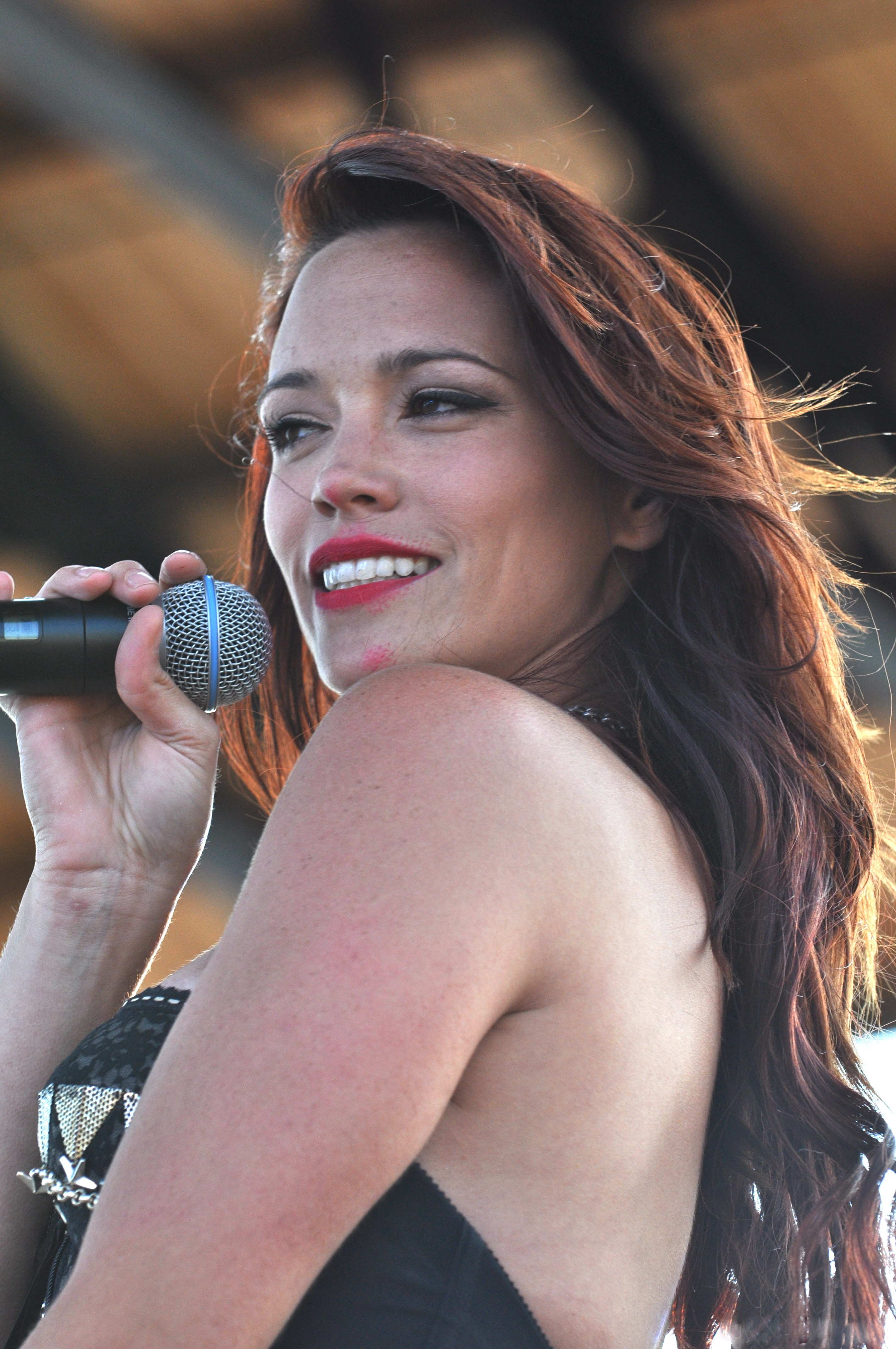 Jessica Sutta - DS Pride -DSC_2565- 9.1.12